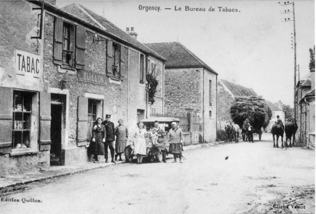 café d'Orgenoy années 20